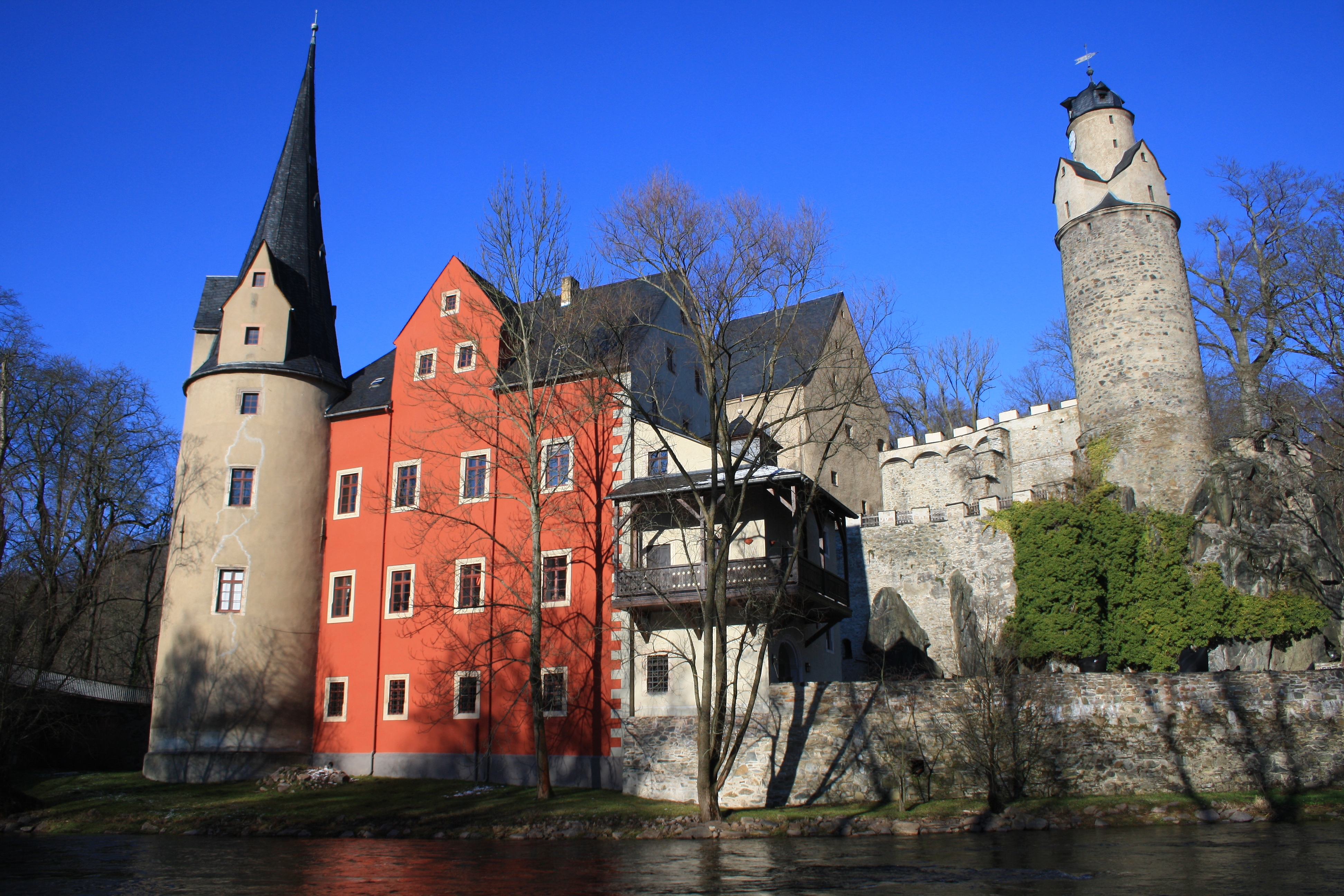 Sachsen, Erzgebirge, Hartenstein, Burg Stein.